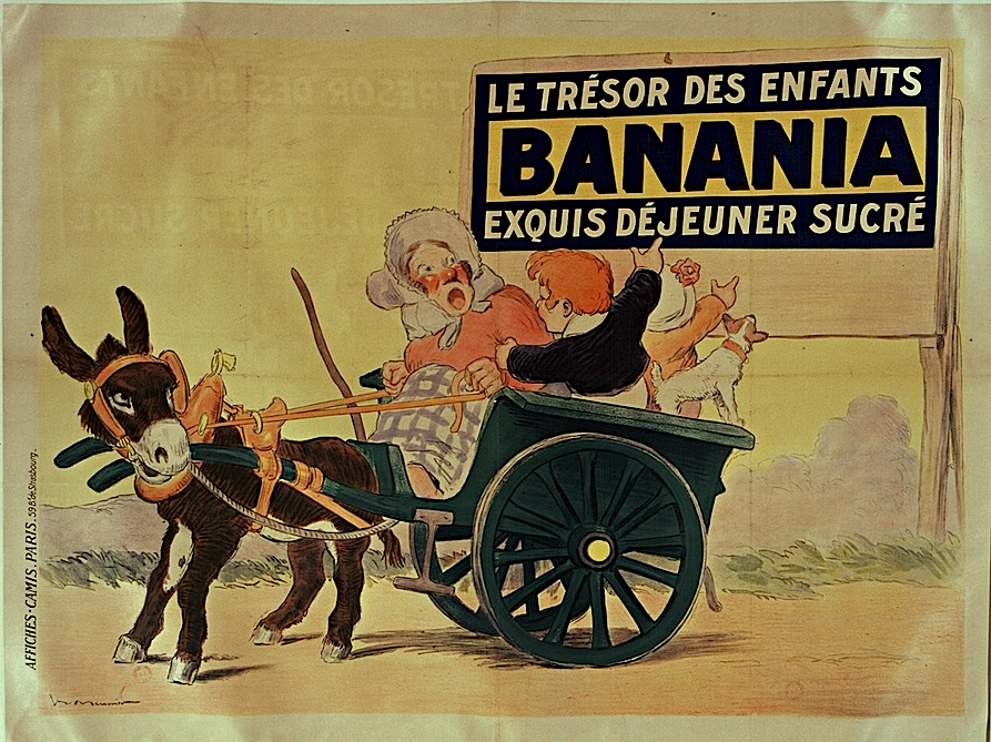 Affiche Le Trésor des enfants Banania par Georges Meunier — Affiche Camis, Paris.